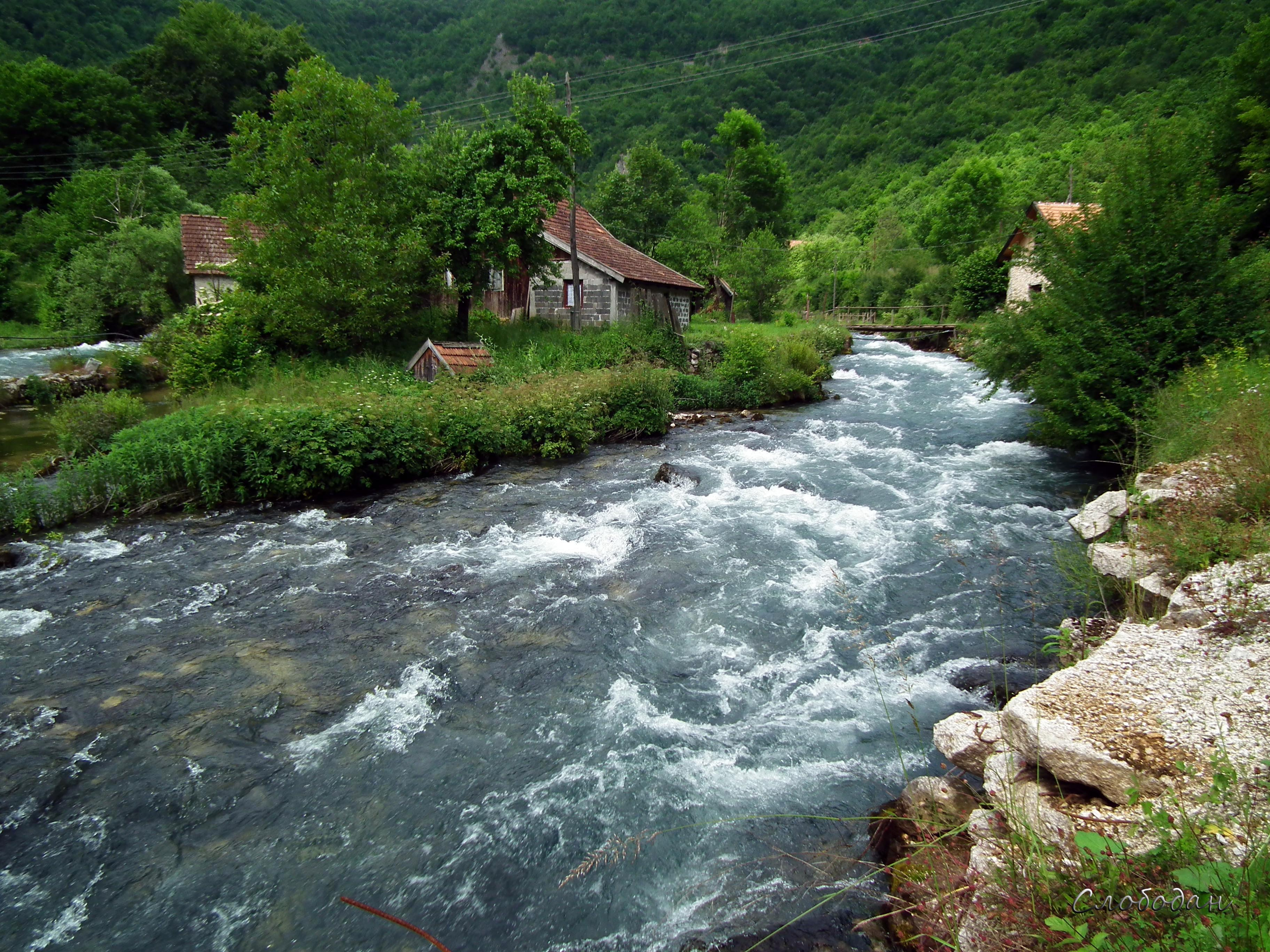 Заштићени природни предио Плива PZPP016